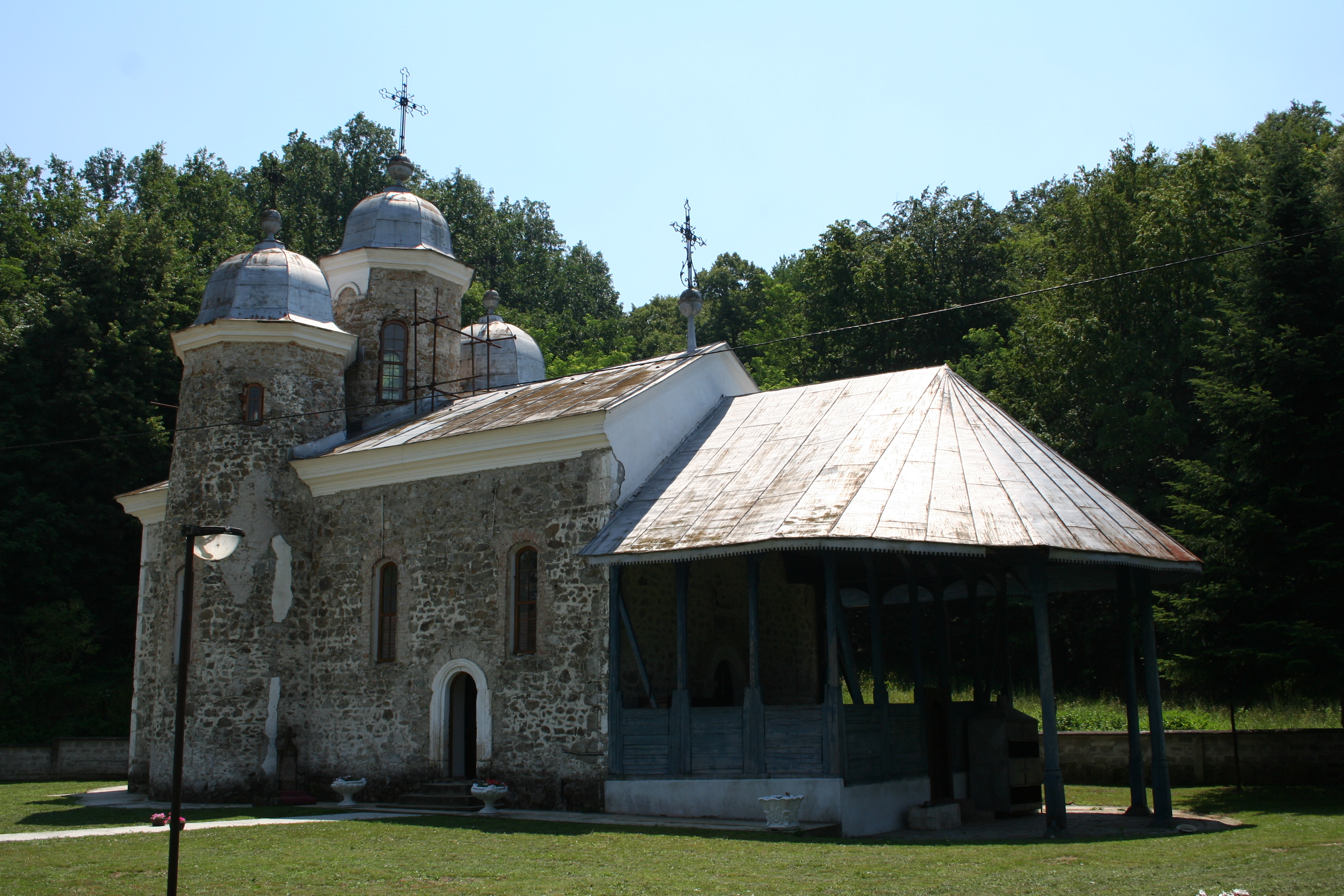 Crkva Preobraženja Gospodnjeg, Krivaja